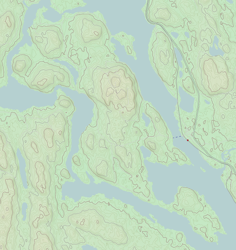 Insjöön Ammerön i jämtländska Revsundssjön.